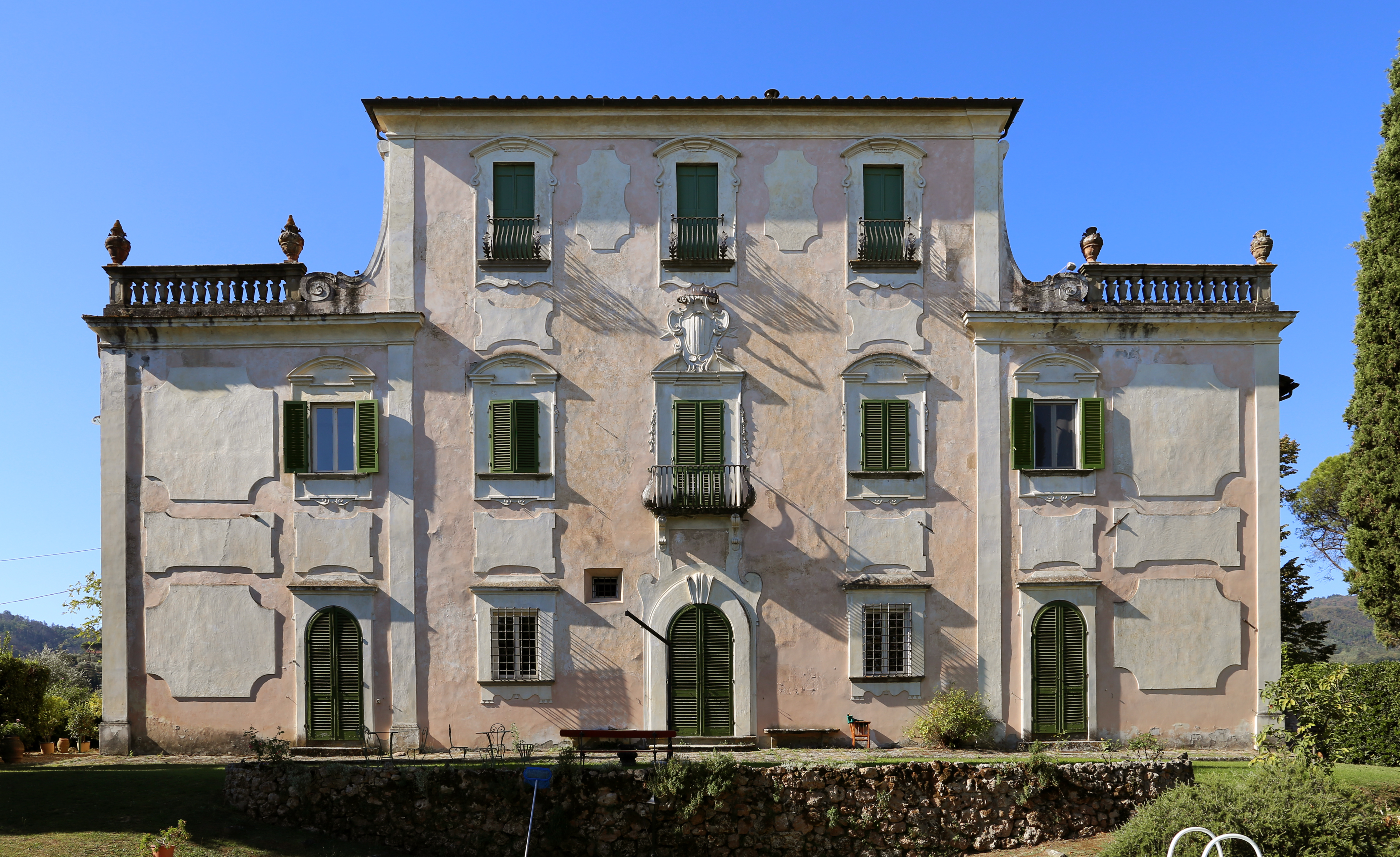 Villa de' Rossi This is a photo of a monument which is part of cultural heritage of Italy.